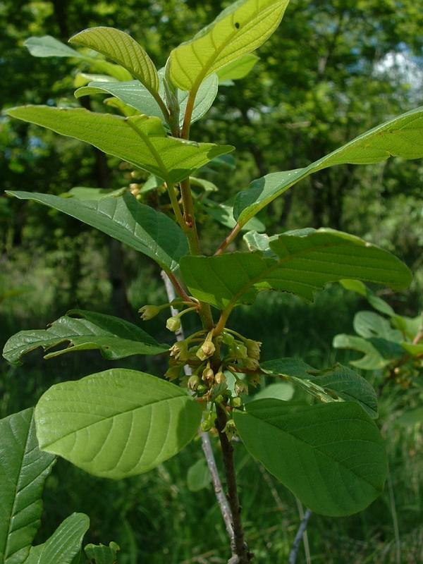 Frangula alnus Bourdaine, Bucey-lès-Gy.